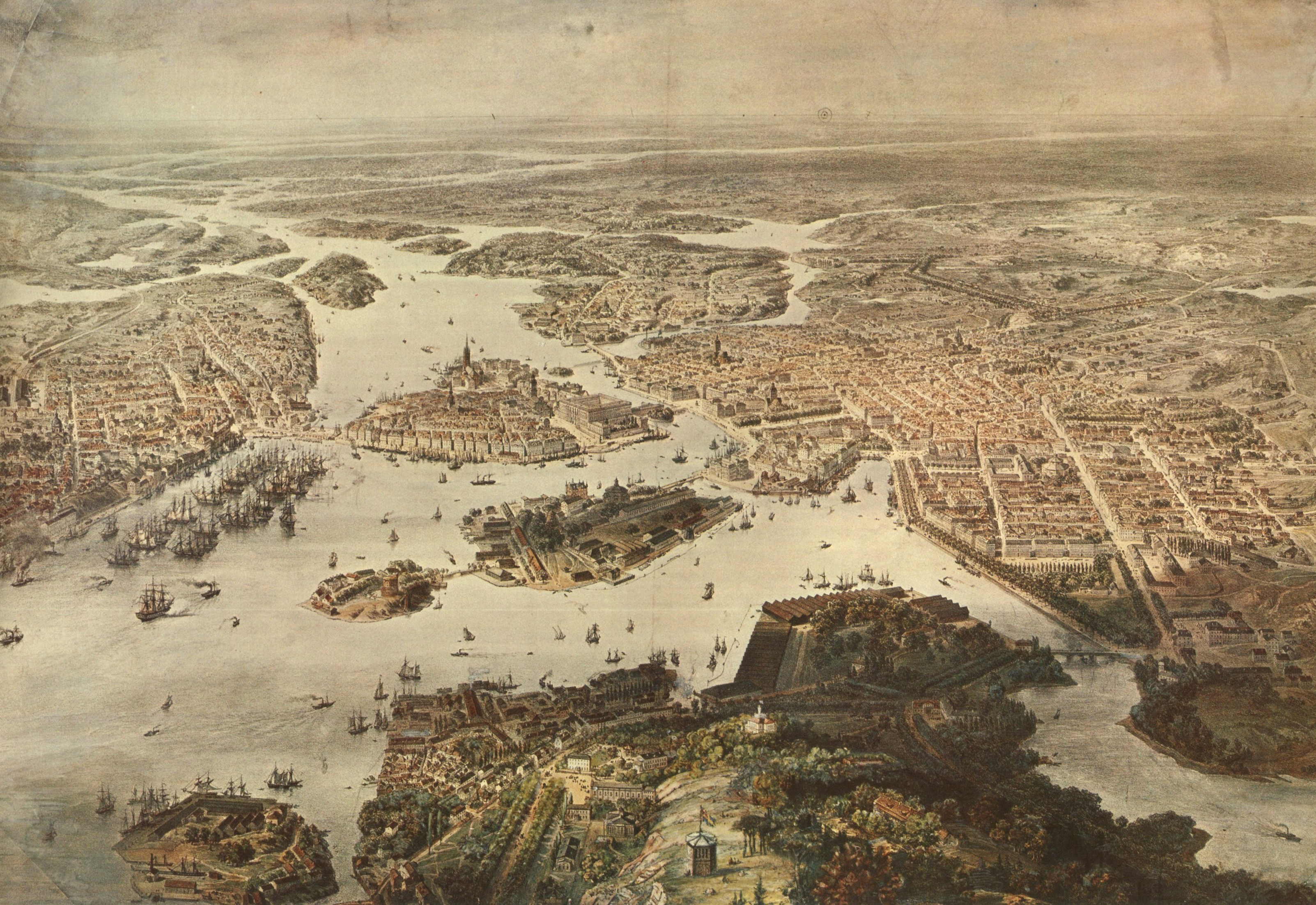 Stockholm panorama. Lithography by Carl Johan Billmark 1868